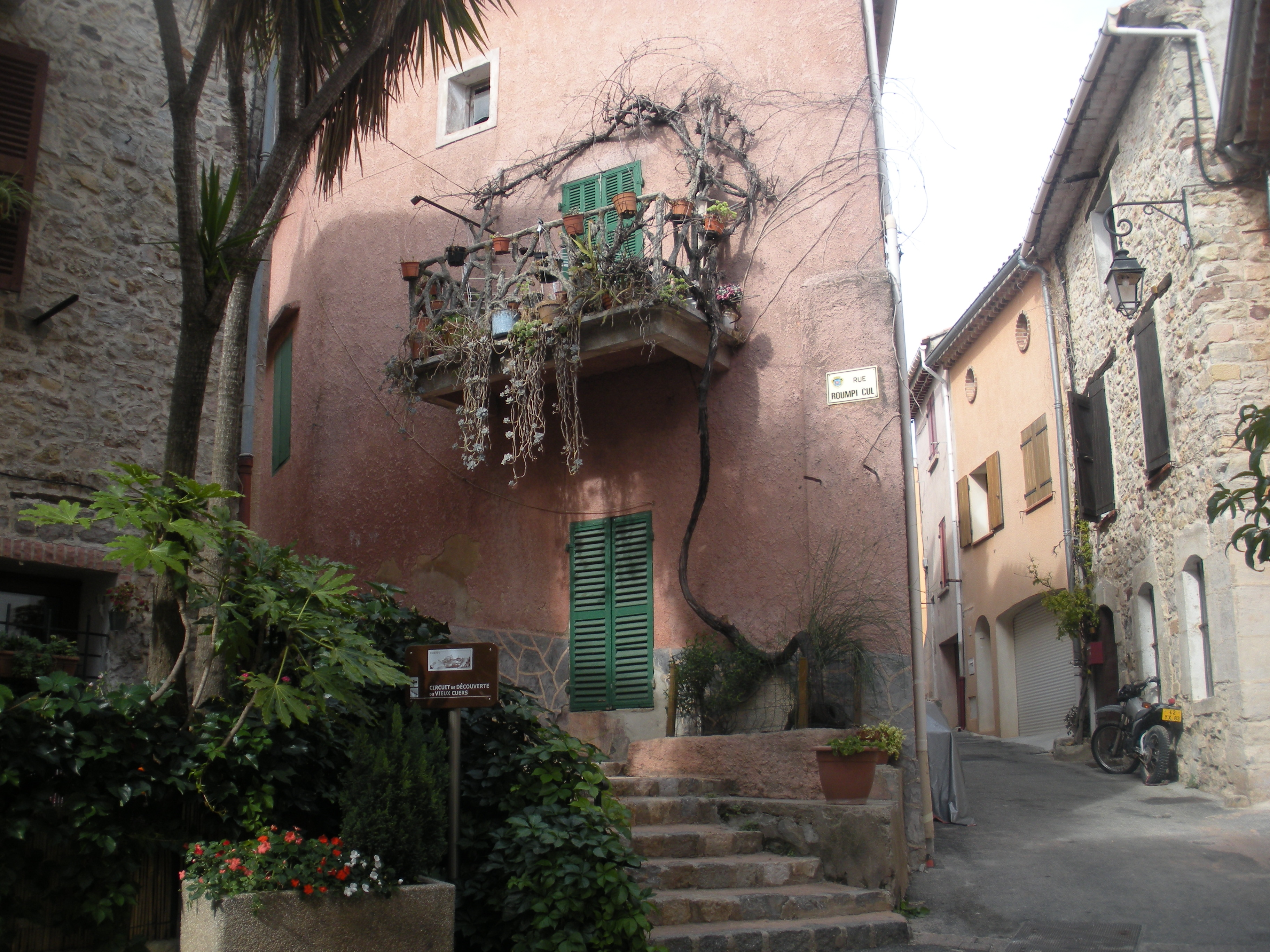 Carrièra de Cuers (Rue Roumpi Cul)